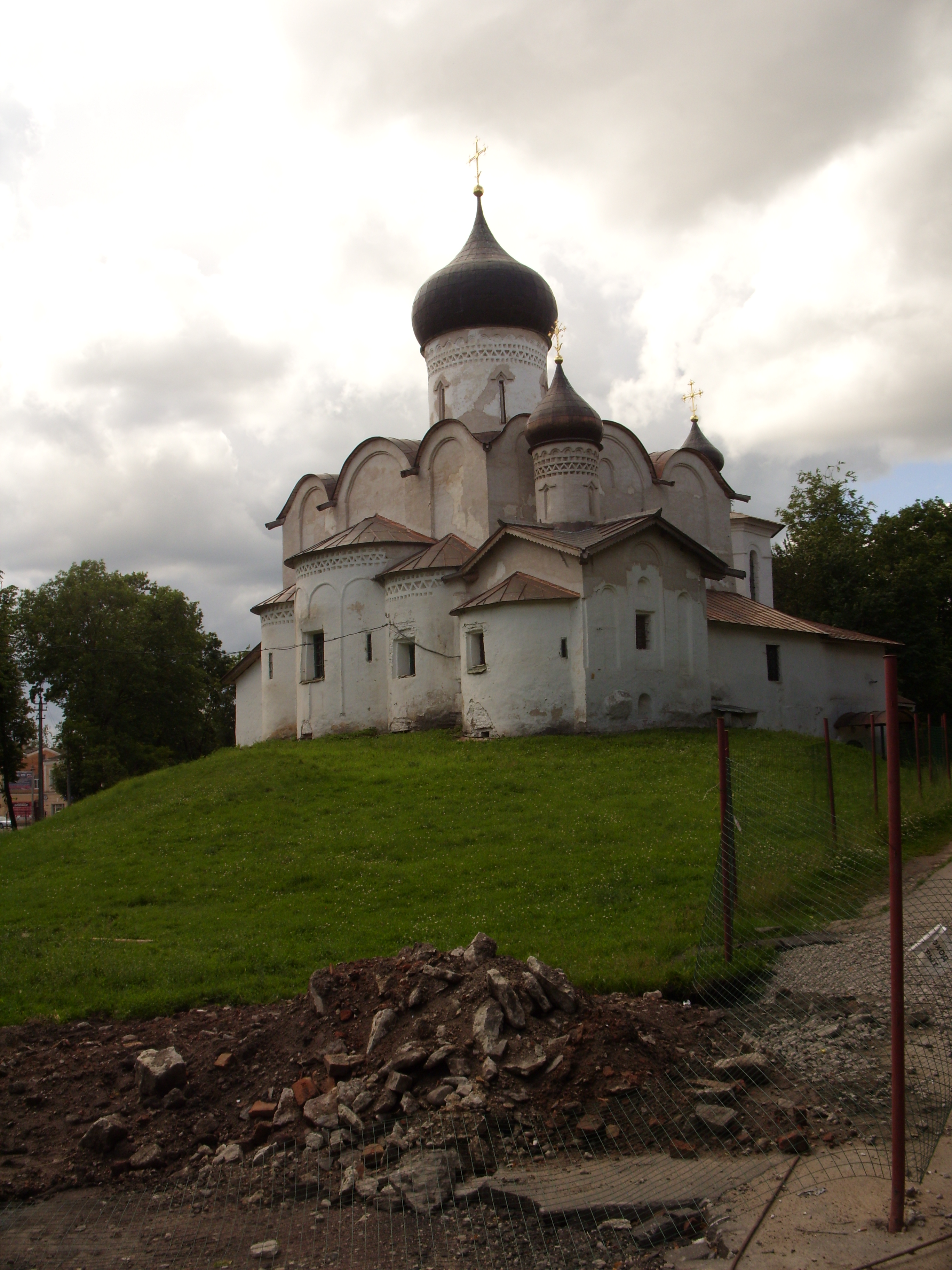 Pskov. Vasiliya na Gorke